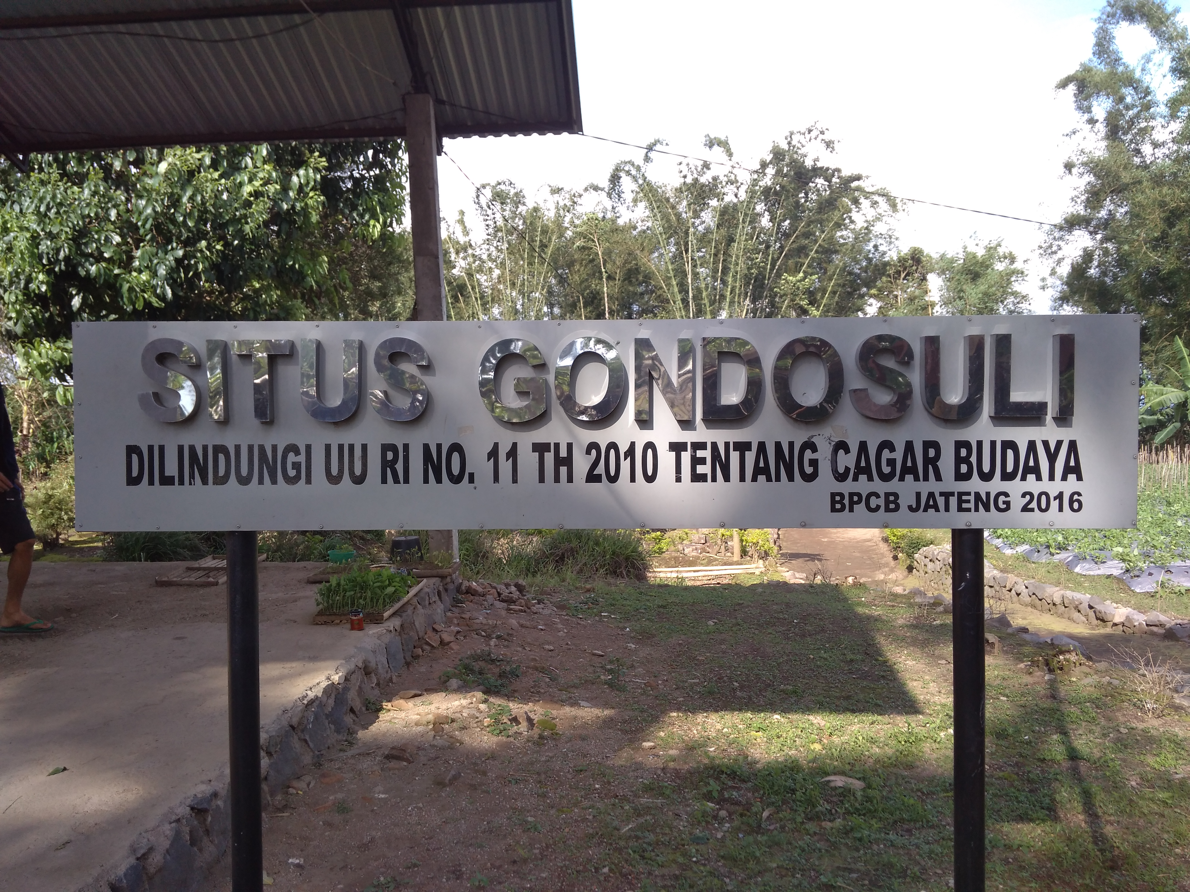 Plang Situs Gondosuli di Temanggung